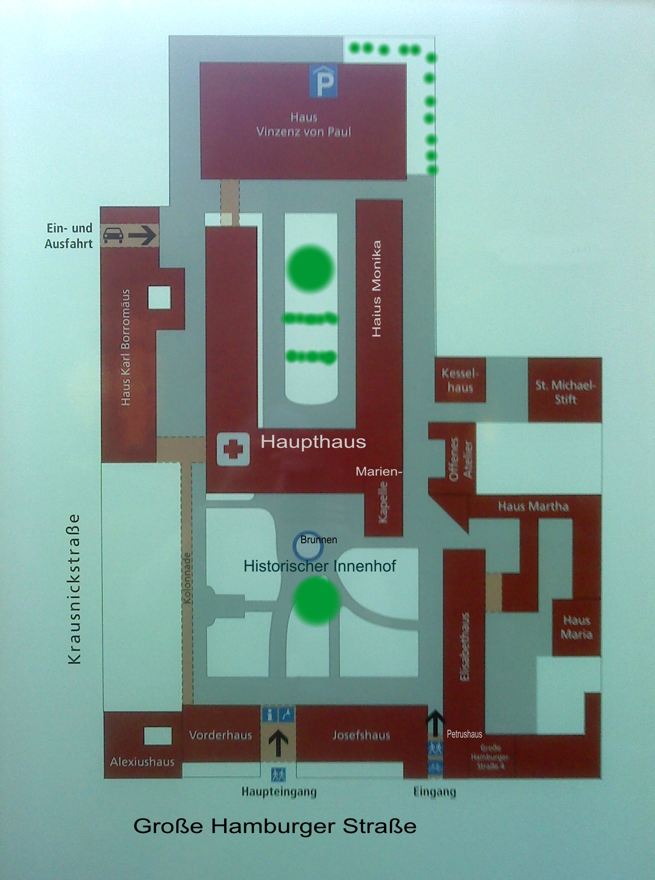 St. Hedwig-Krankenhaus: Lageplan, von den öffentlichen Infotafeln abfotografiert und nachbearbeitet